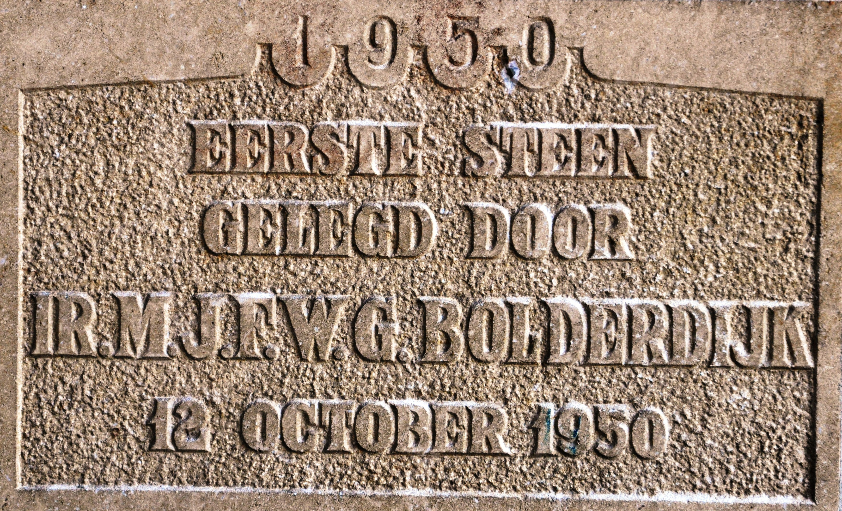 Ontspanningscentrum De Boô in Schoonebeek is een ontwerp van architect Arno Nicolai.